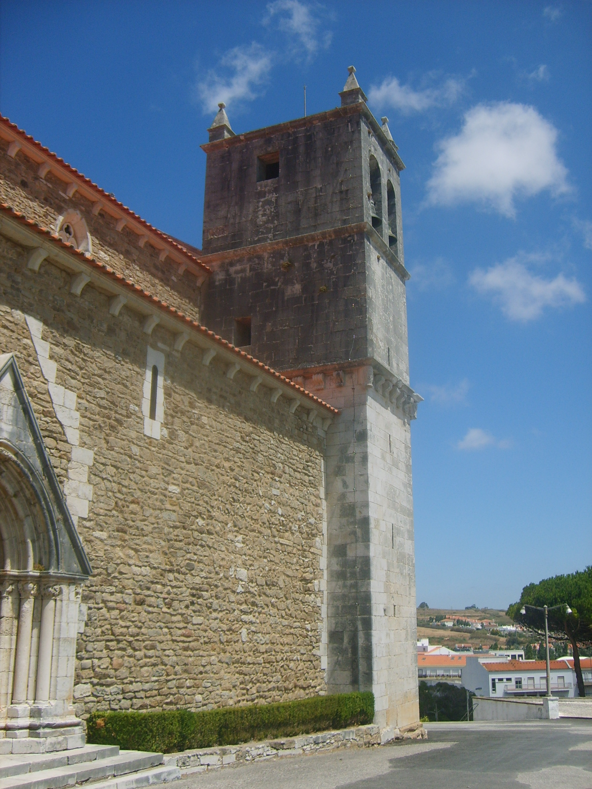 Igreja Matriz da Lourinhã